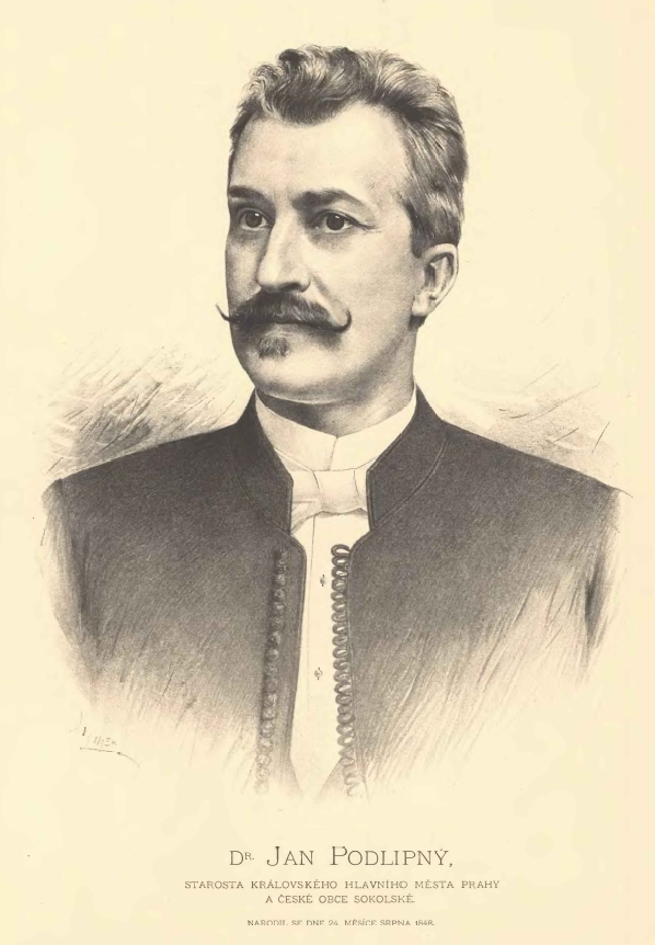 Portréty českých osobností od Jana Vilímka